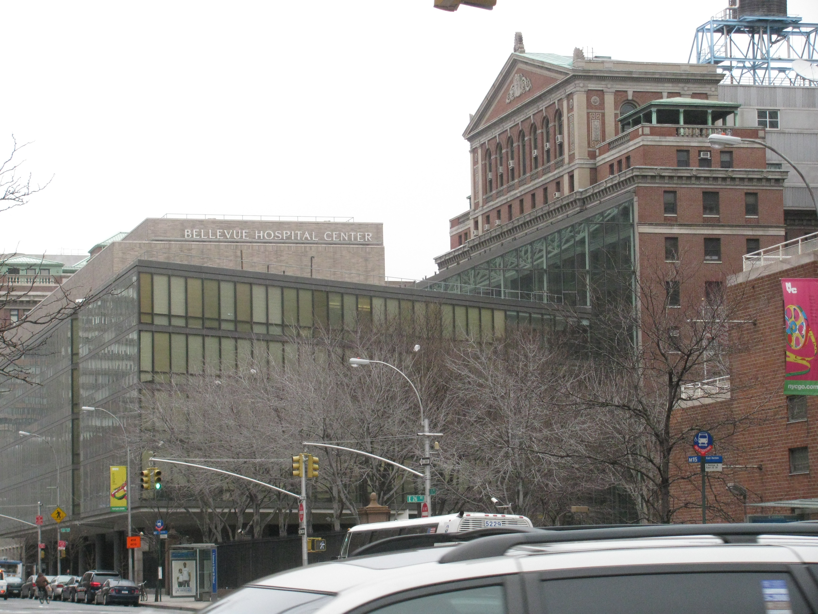 Bellevue Hospital Center